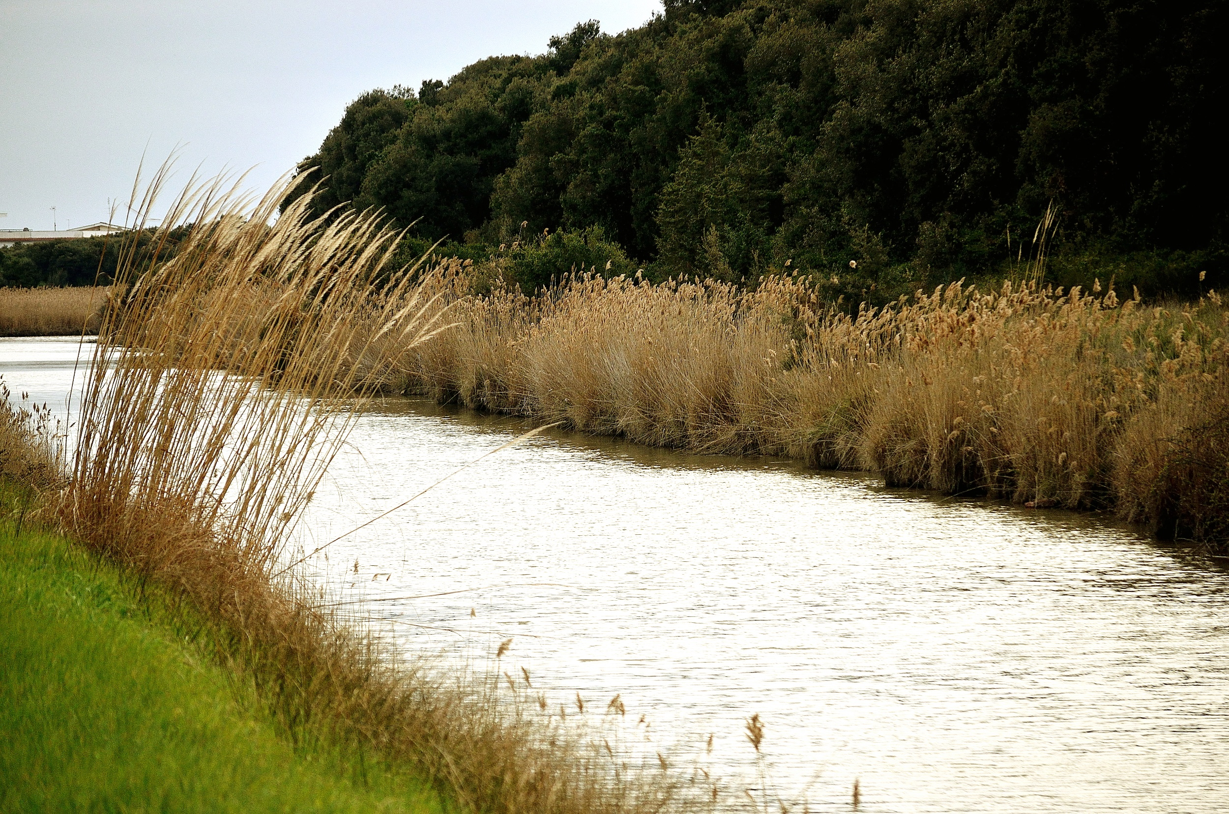 Oasi di Macchiagrande This is a photo of a monument which is part of cultural heritage of Italy. The authorisation for taking photos of this object was provided by the World Wide Fund for Nature Italy.